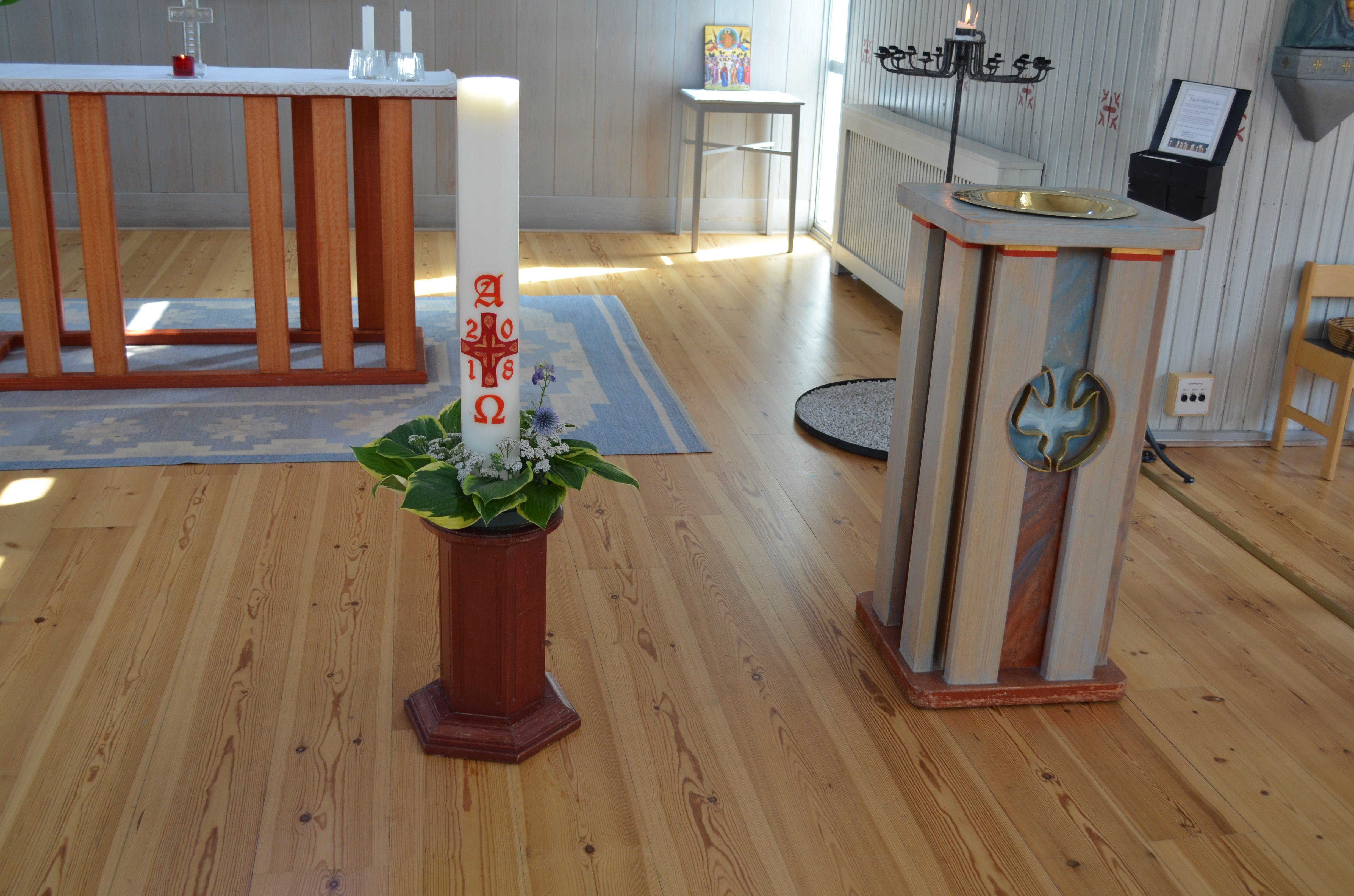 Dopfunten.